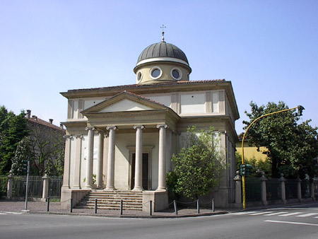 Oratorio di S. Lucio - Tempietto